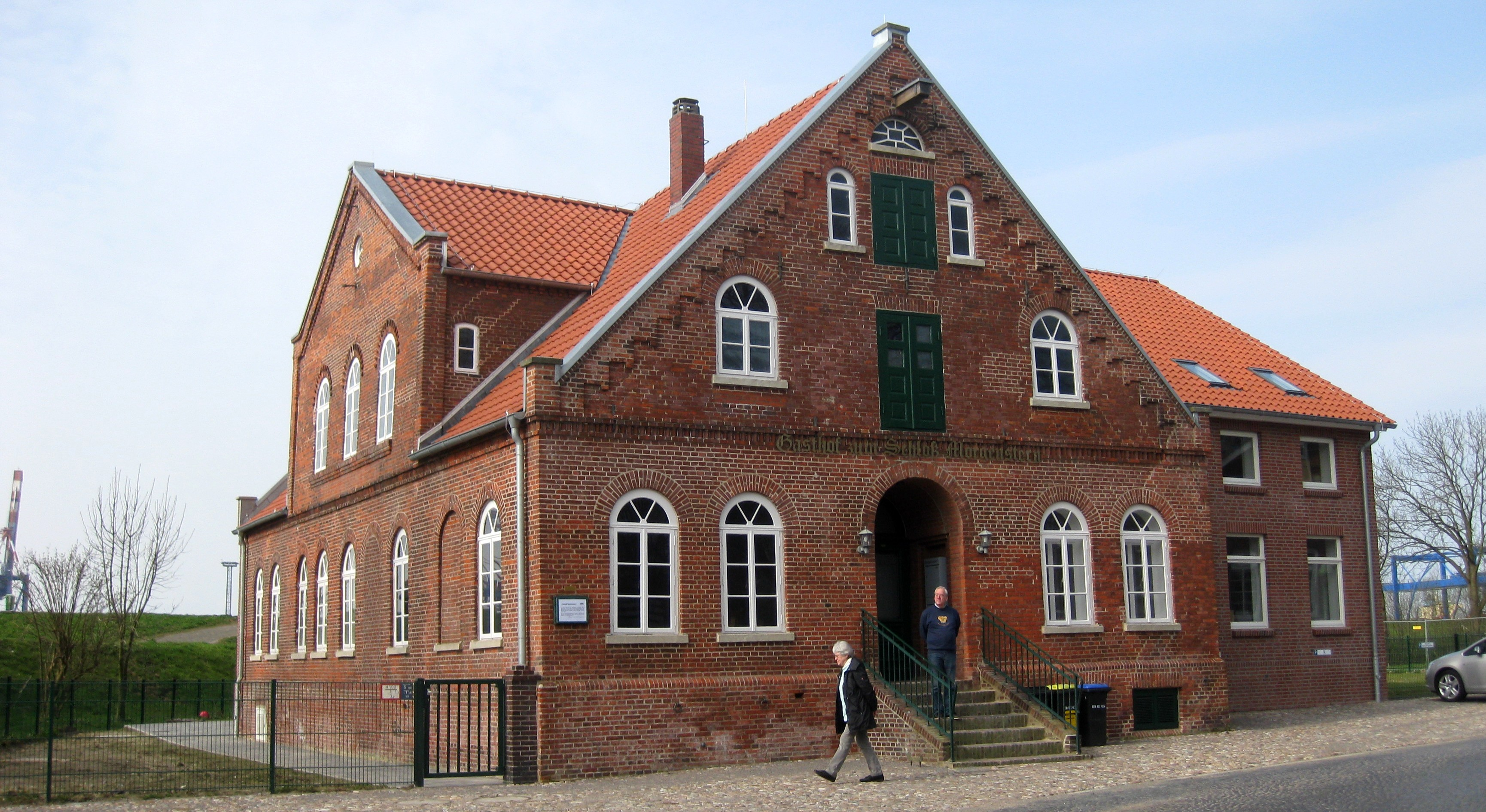 Schloss Morgenstern, Bremerhaven-Weddewarden, Gasthaus auf dem Gelände der damaligen Zwingburg "Morgenstern" des Bremer Erzbischofs gelegen, die Burg wurde 1518 von freiheitsliebenden Wurster Bauern zerstört. In der "Friesenstube" des Gasthauses gründete 1882 Hermann Allmers den Heimatverein der Männer vom Morgenstern. Die Gastwirtschaft schloss im März 2010. Das Haus wird von den Männern vom Morgenstern für Seminare und ihre Bücherei genutzt.